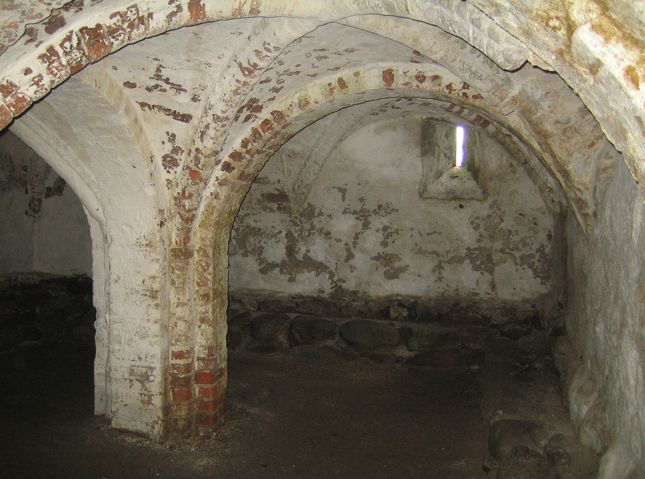 Medieval cellar at Ivö, Sweden